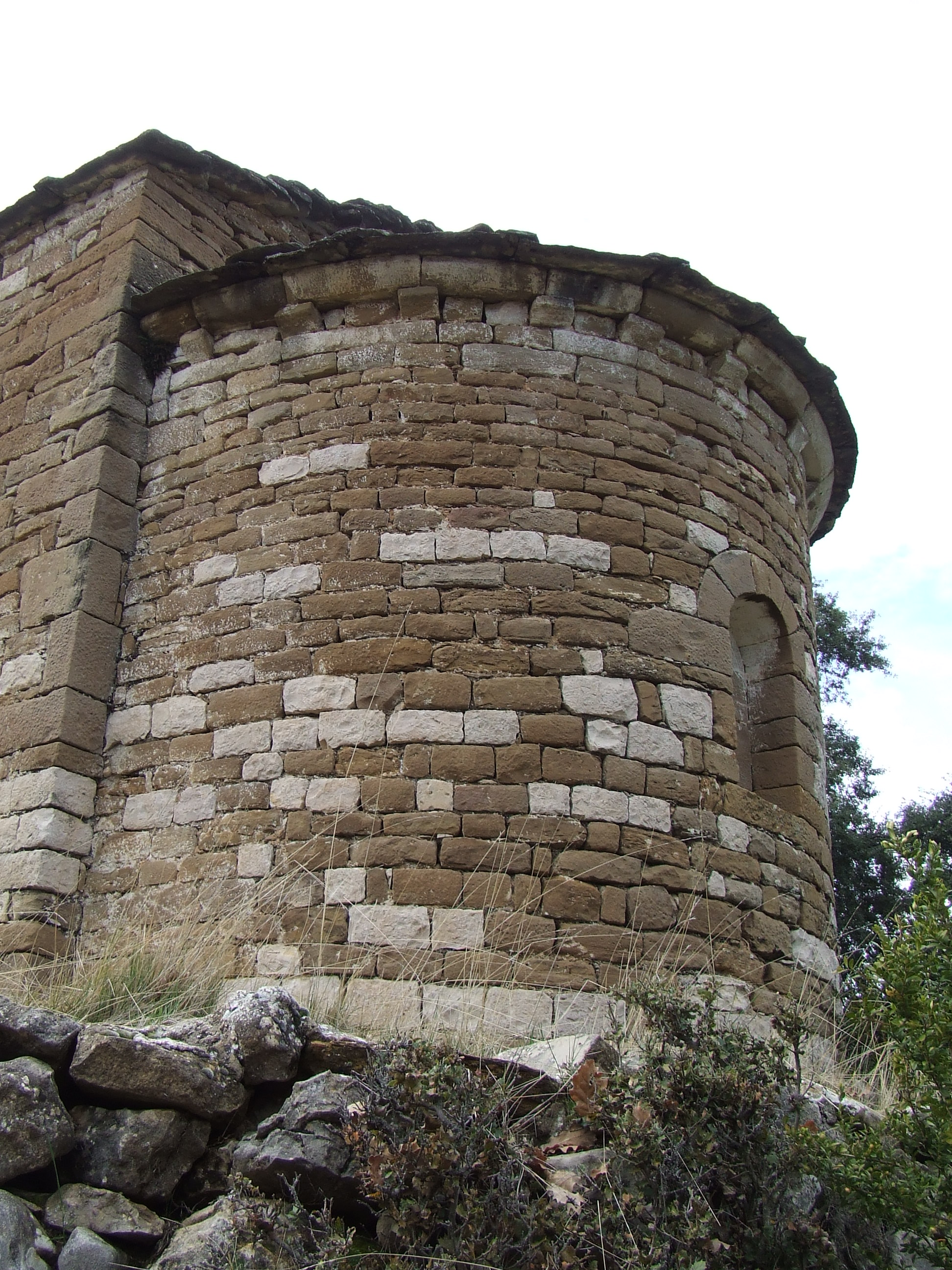 Absis de la Mare de Déu de Fabregada (Sant Esteve de la Sarga, Pallars Jussà)